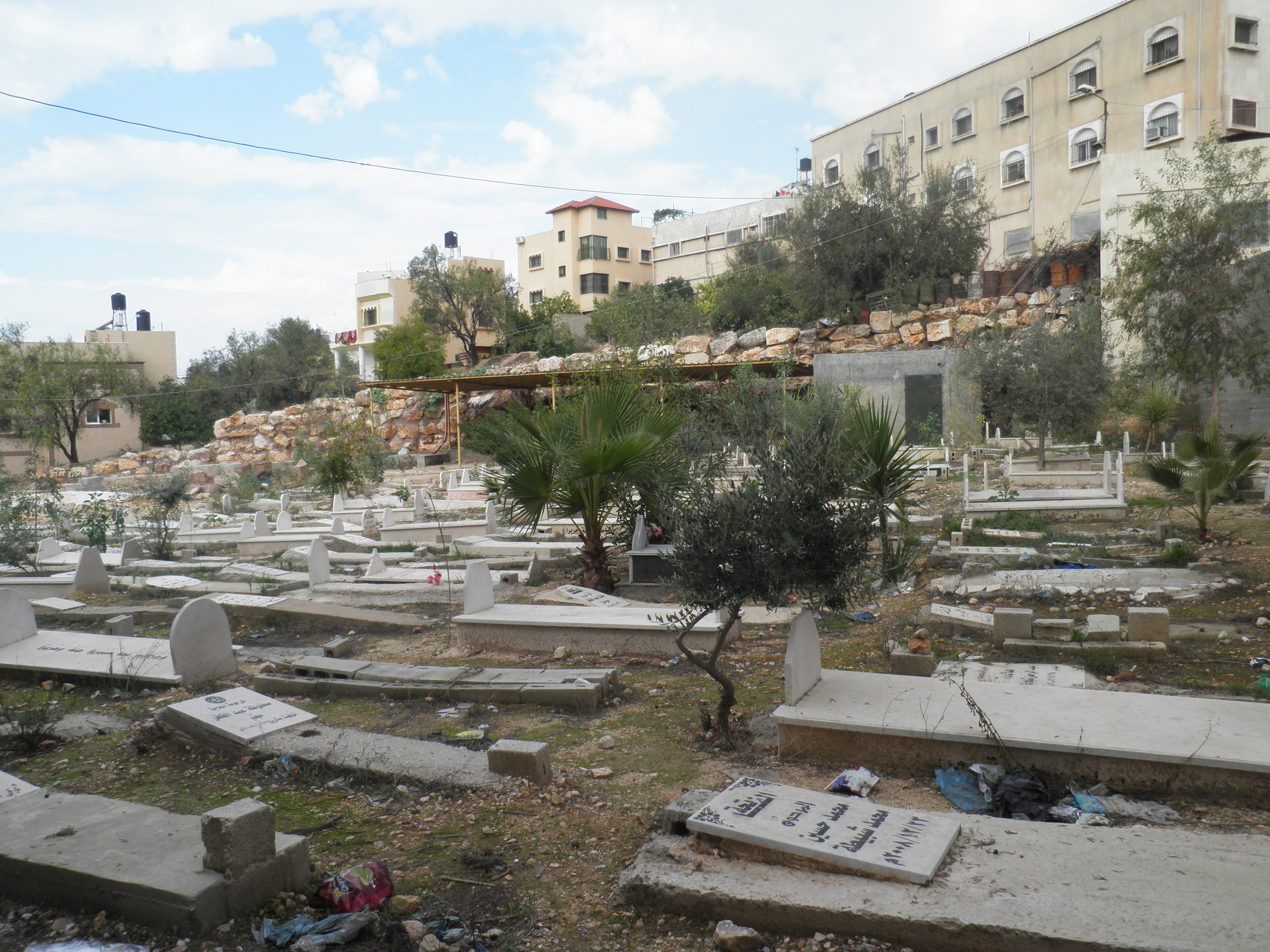 העיירה הפלסטינית שבשומרון "עזון" עזון - בית הקברות